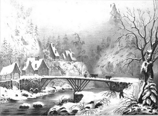 Livet, près de Bourg d'Oisans (Isère)